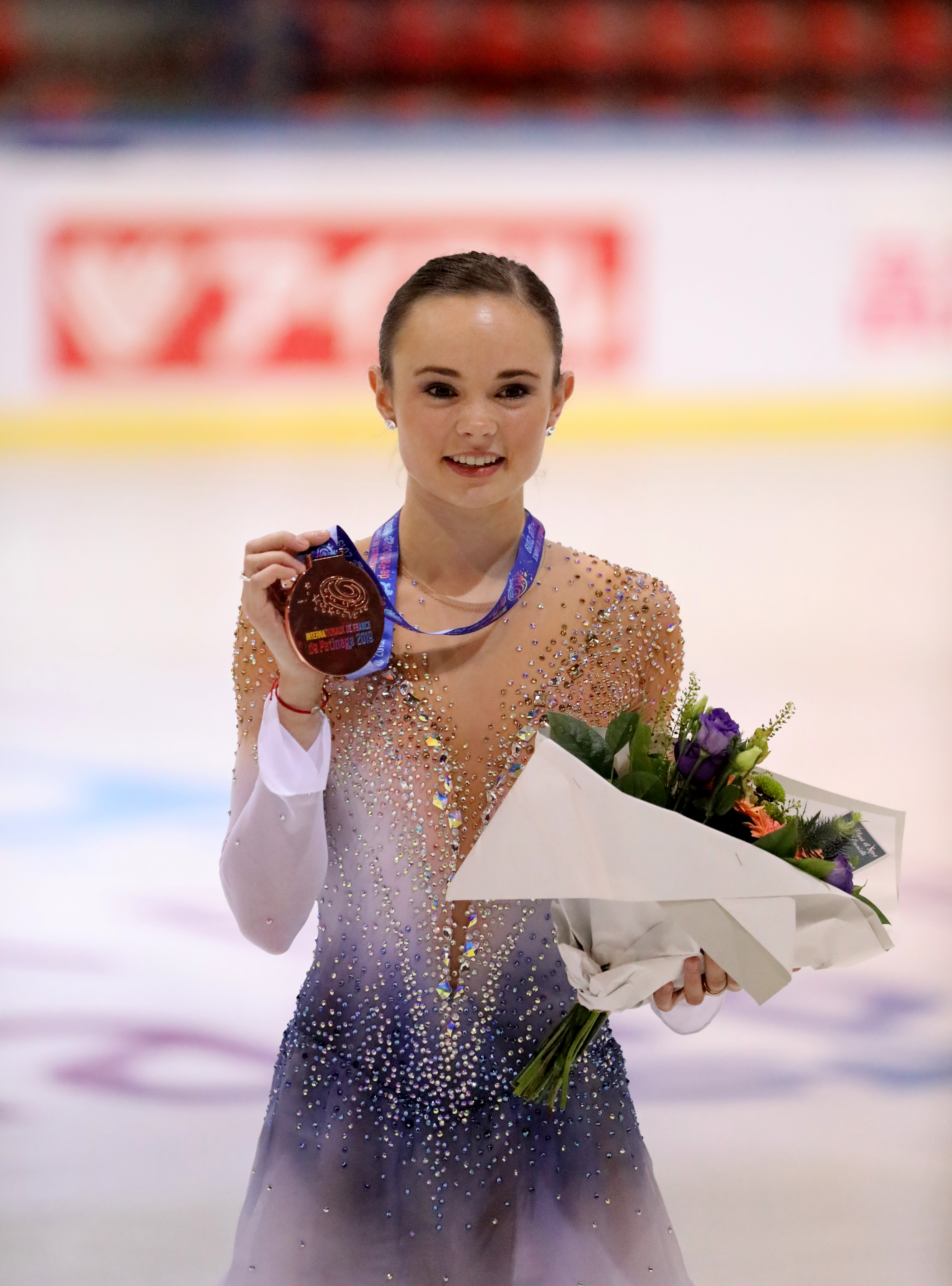 Internationaux de France 2019